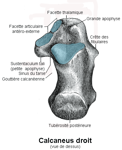 Calcaneus droit. Vue supérieure